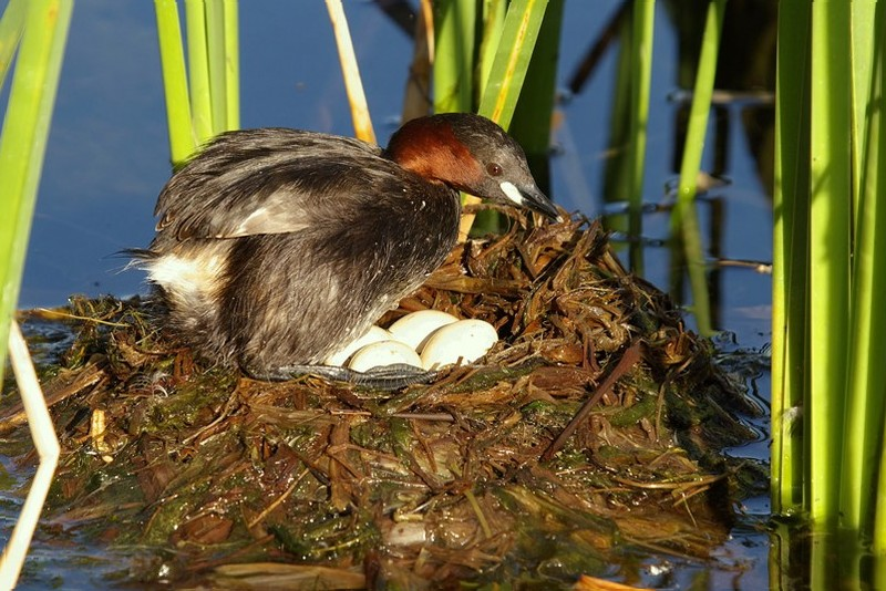 Grèbe castagneux Tachybaptus ruficollis Little Grebe